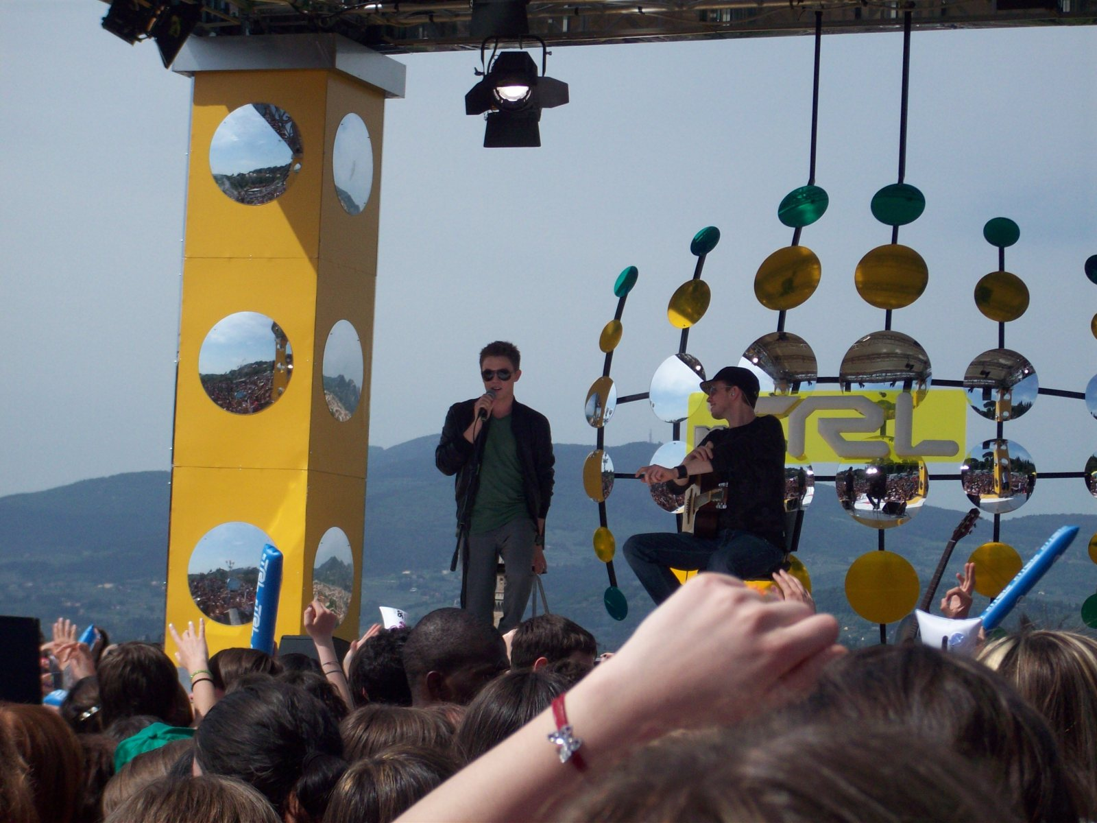 jesse mccartney a firenze per la promozione del suo nuovo cd